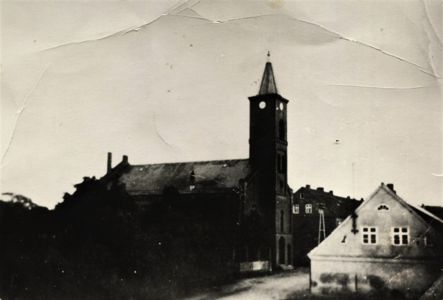 Neue Kirche Seckenburg um 1938